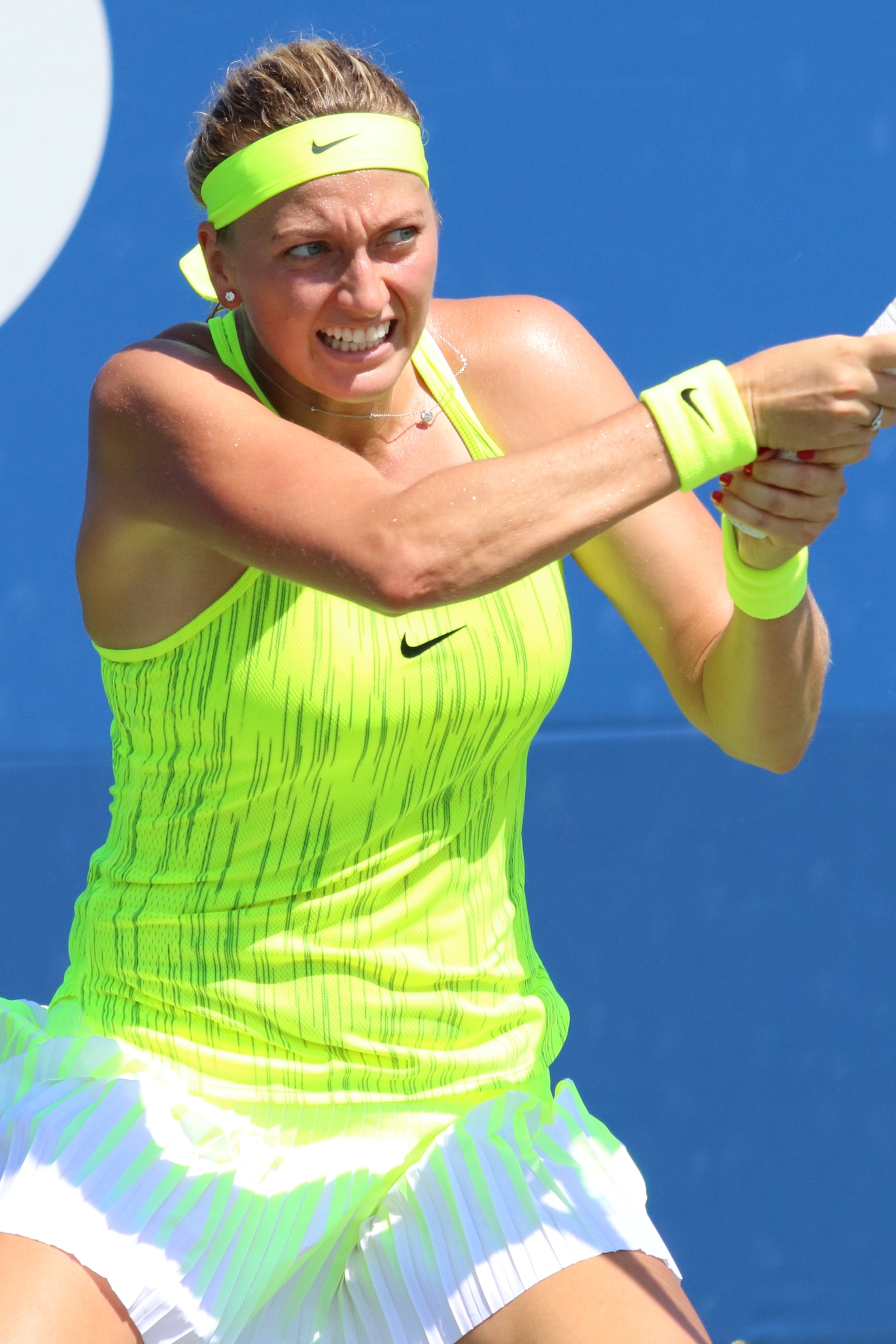 Kvitova US16 (31)